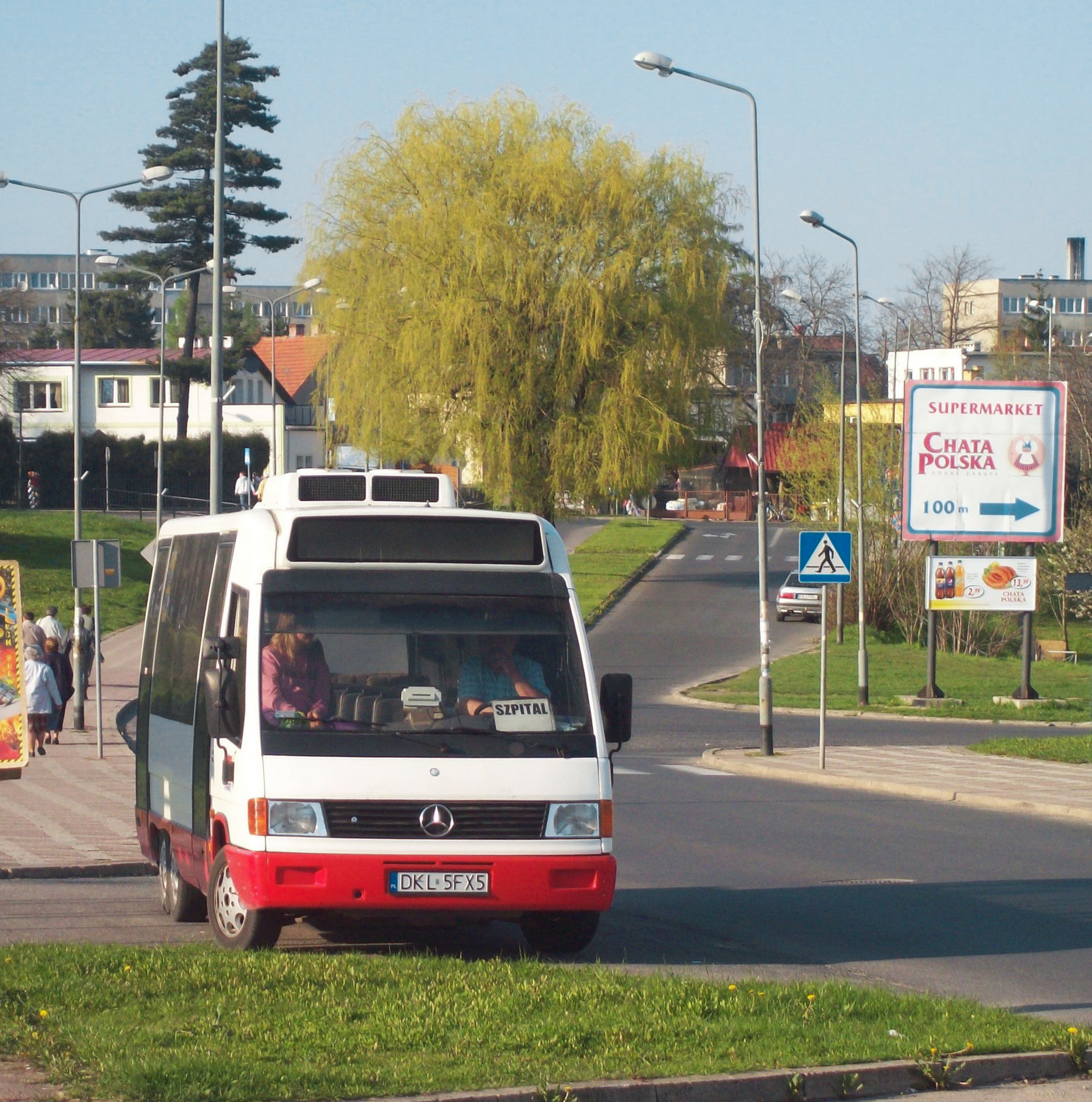 Bus A-Visty głównego przewoźnika na ternie Kłodzka